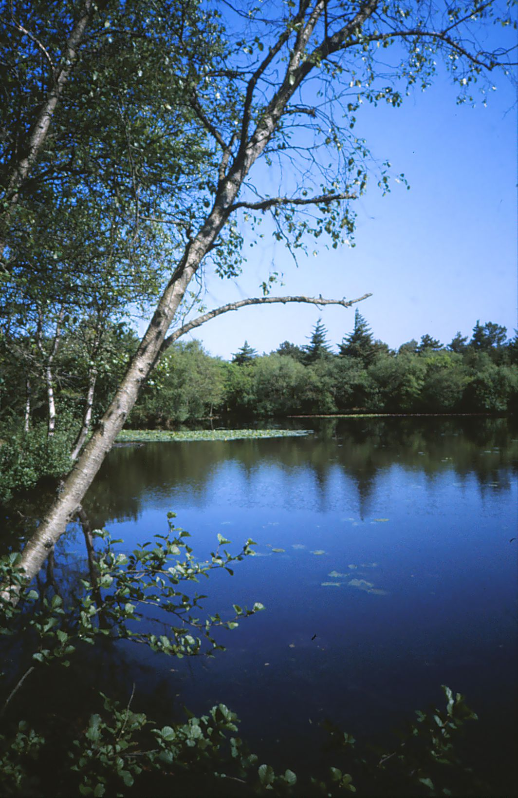 Den ene af søerne ved Tversted i Vendsyssel. 20. maj 2000.